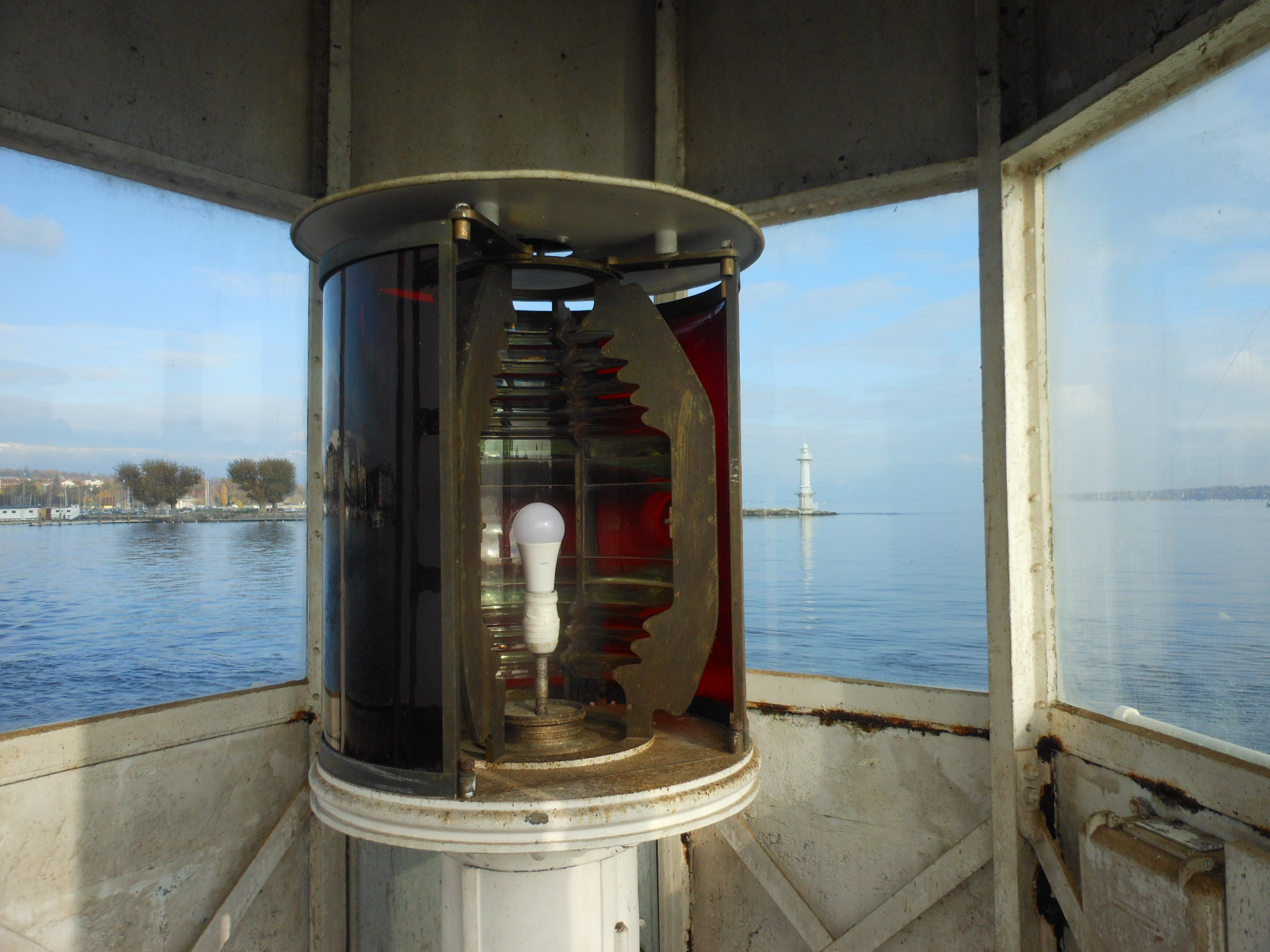 Au premier plan, les lentilles de Fresnel (dispositif fixe couvrant un champ de 270° a été mis en fonction en 1911), doublées de caches rouges en quarts de rond en verre. Au centre une ampoule de 150 Watts. Au second plan en partant de la gauche, les Bains des Pâquis et au bout de la jetée, le Phare du même nom. Devant la passe d'entrée de la Rade (230 mètre) au delà le "Petit lac ou lac de Genève".